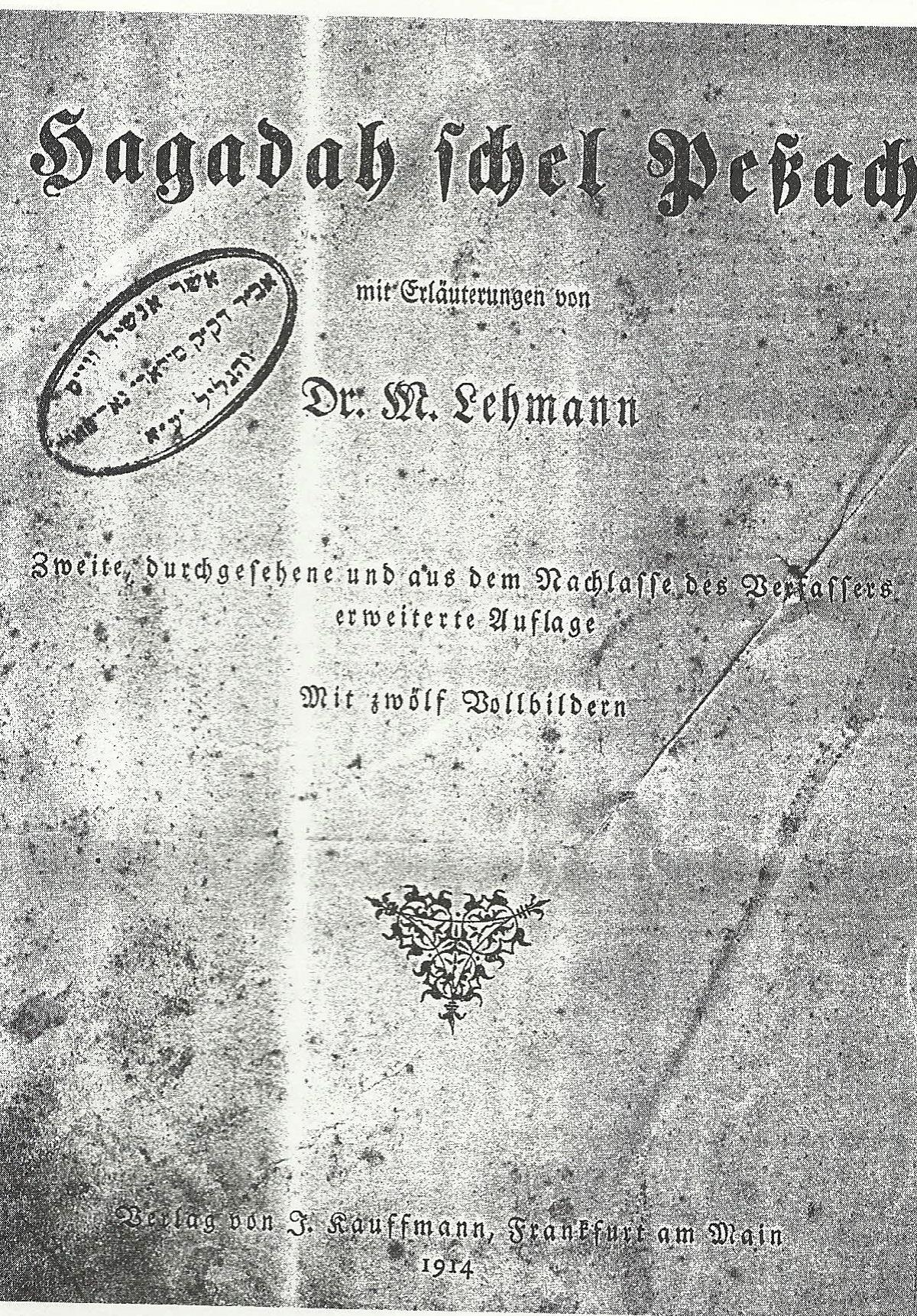 הגדה של פסח בחתימת רב הקהילה ר' אשר אנשיל וייס.